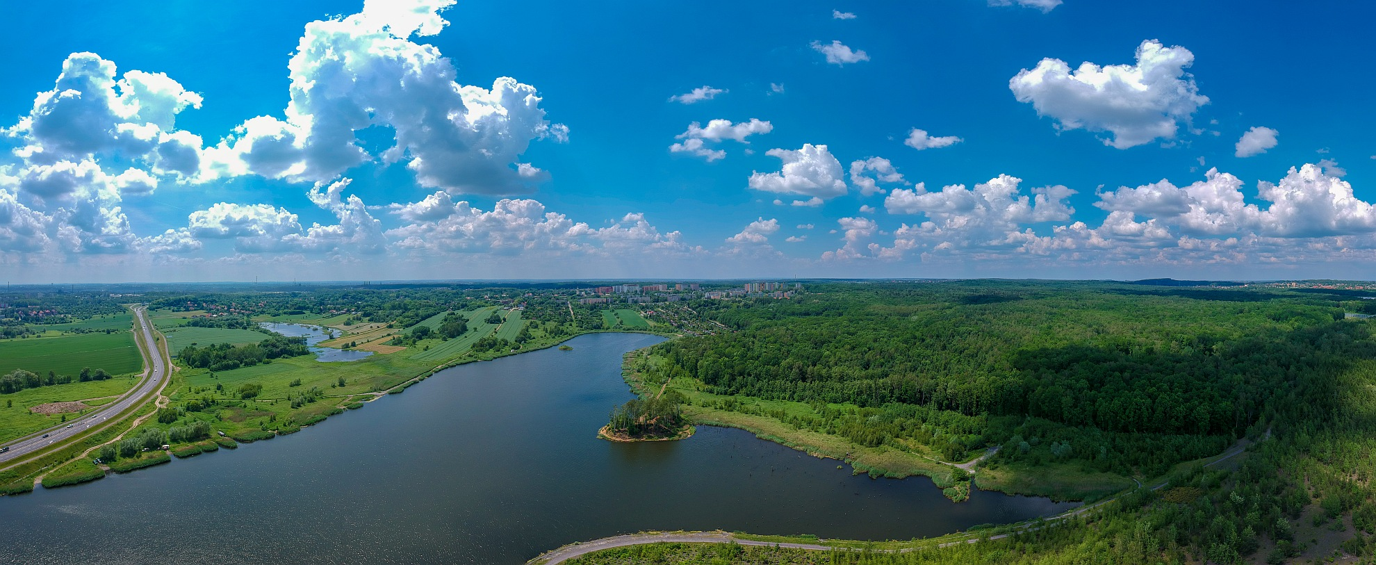 Staw Brandka - panorama z bytomskim osiedlem Miechowice w tle